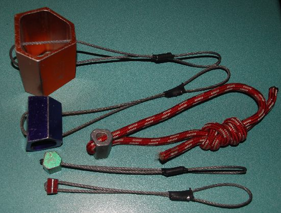 Different Hexcentrics Große und mittlere Hexcentrics mit Hohlprofil, kleine mit Vollprofil, mit Drahtschlingen oder Reepschnur.